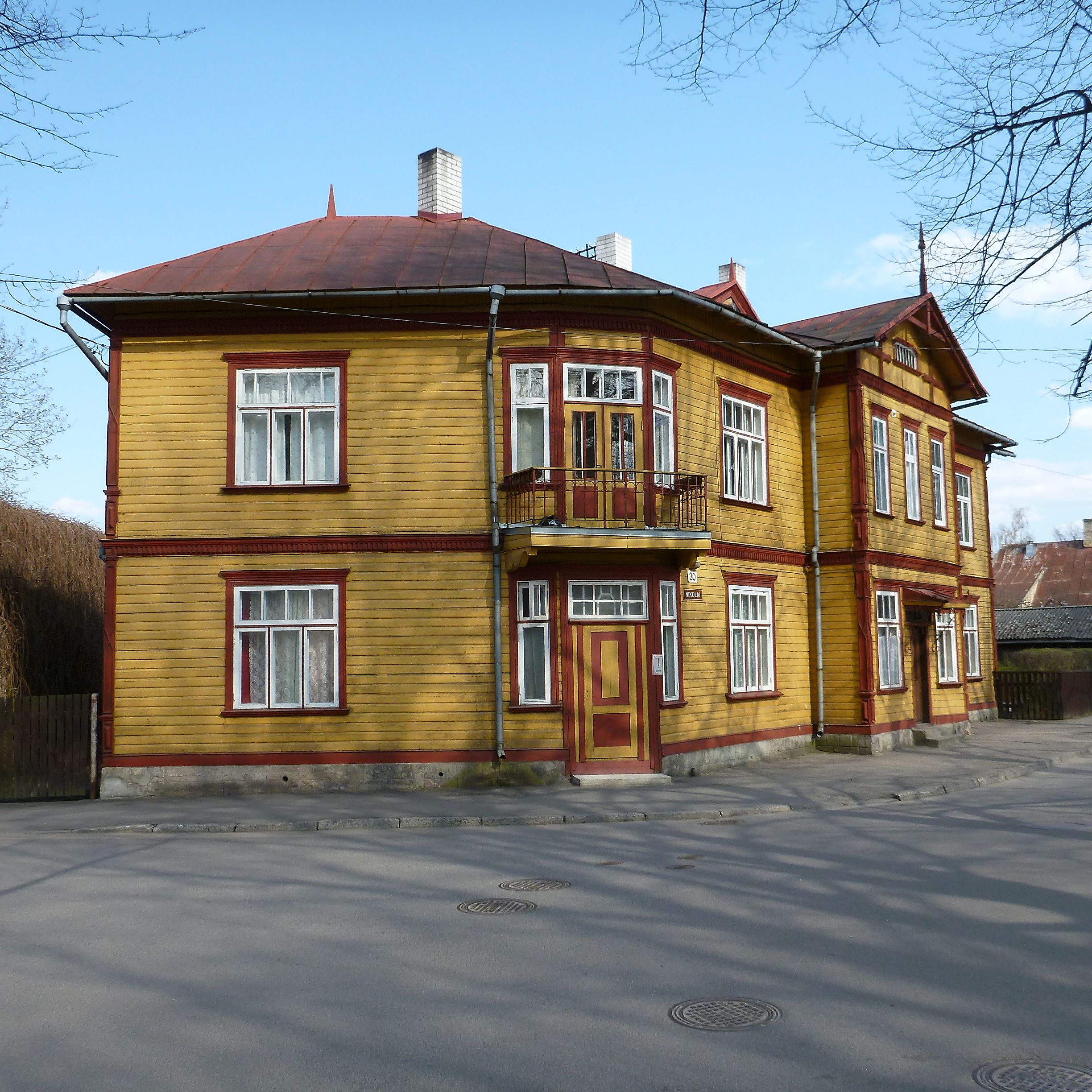 Talo Pärnussa